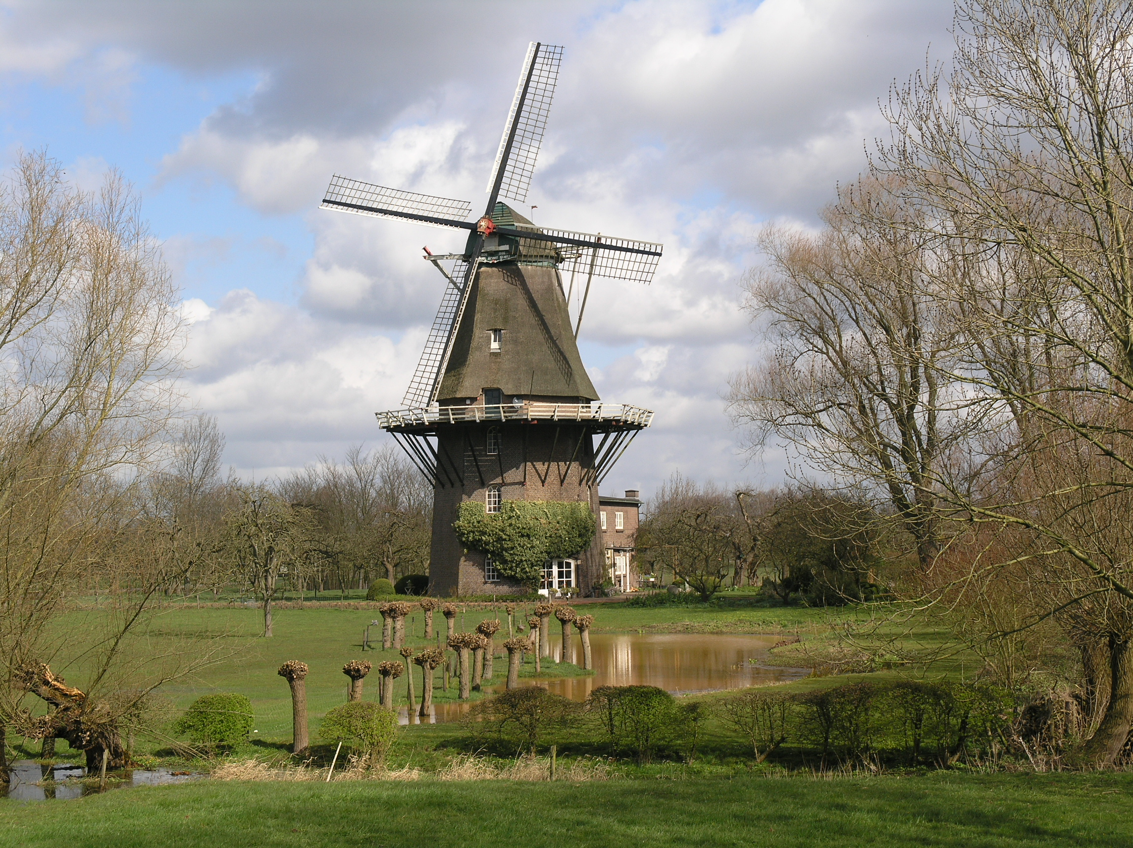 Welsum stellingmolen Houdt Braef Stant